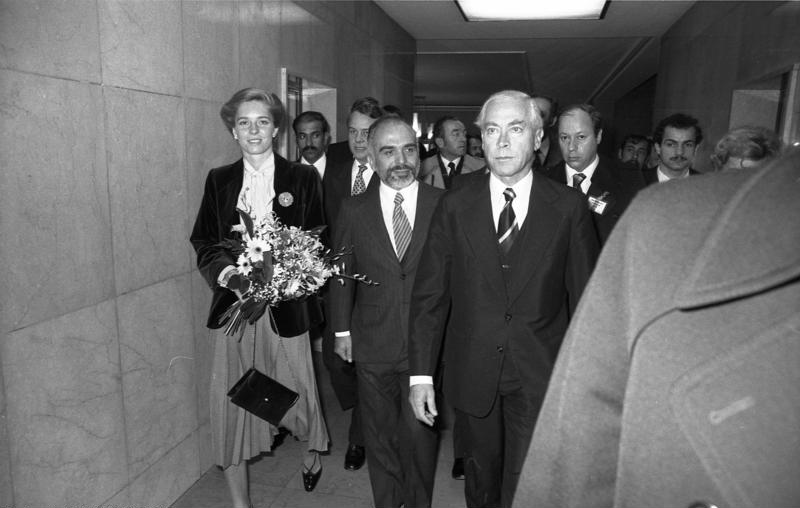 Staatsbesuch König Hussein II. und Königin Nur Al-Hussein in der Bundesrepublik Deutschland. Wolfsburg: Besichtigung des Volkswagenwerks